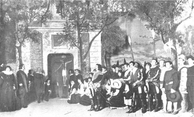 Escena final de la zarzuela El Cristo de la Vega estrenada en 1915 en el Teatro Price